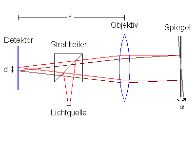 Skizze zur Veranschaulichung der Funktionsweise eines Autokollimators